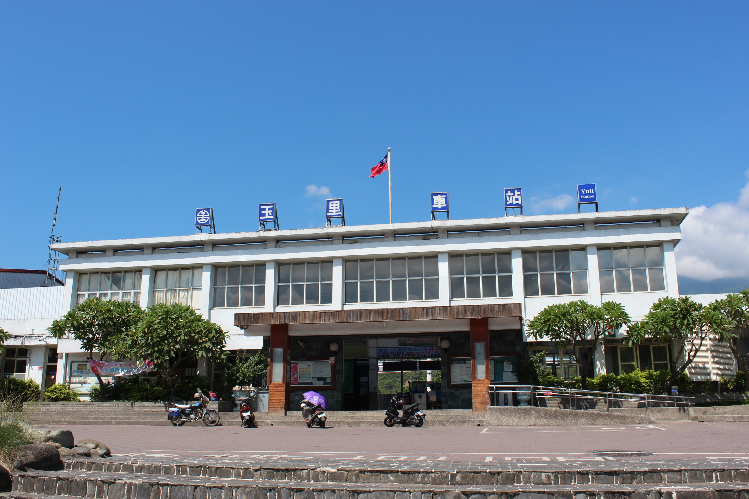 玉里駅